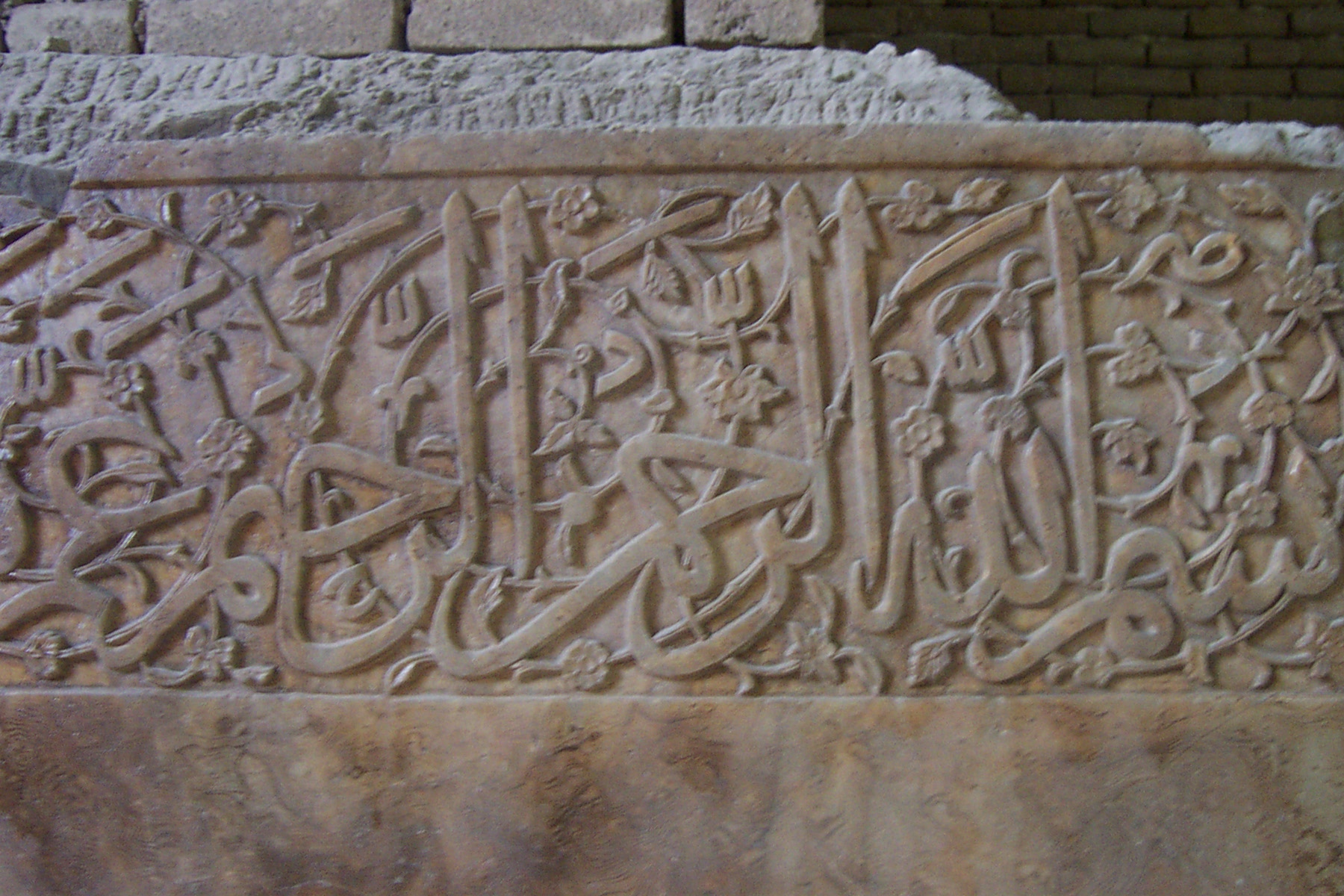 Göy Məscid (Blue Mosque), Tabriz, Iran